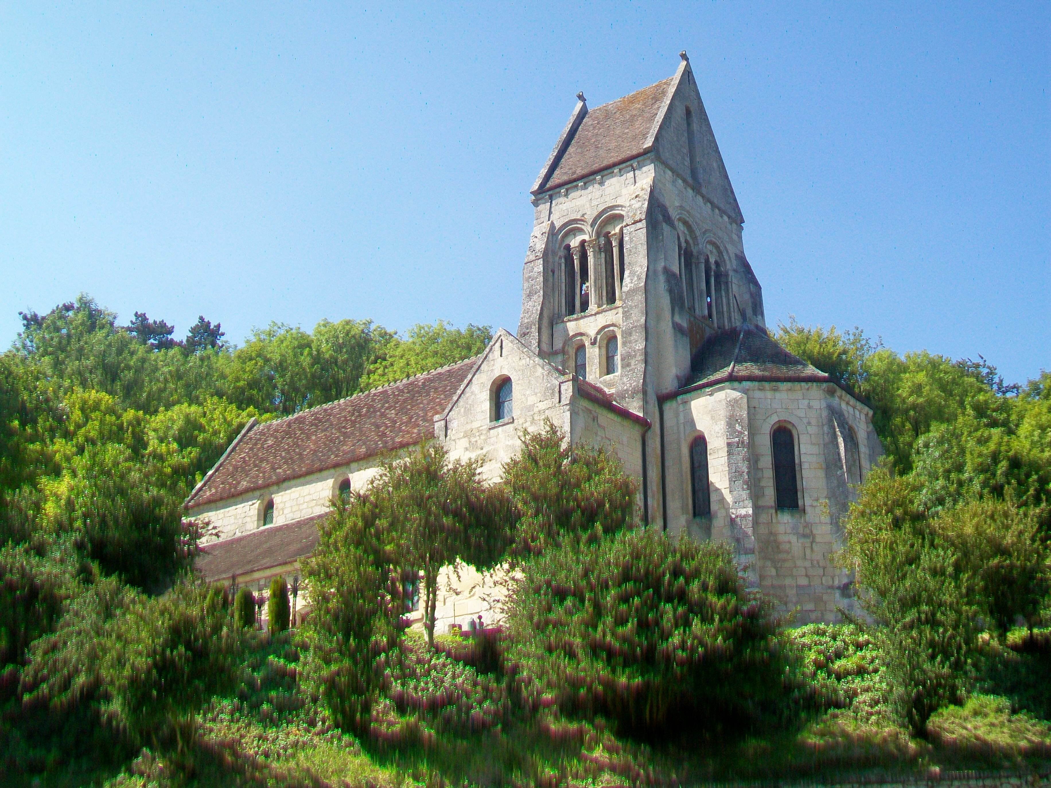 Vue sur l'église depuis l'est, en montant depuis la vallée de l'Automne et depuis le village.